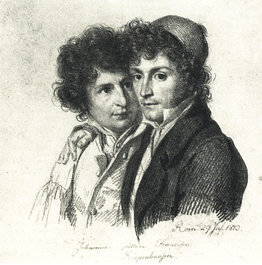 Porträt der Maler Johannes (links) und Franz (rechts) Riepenhausen